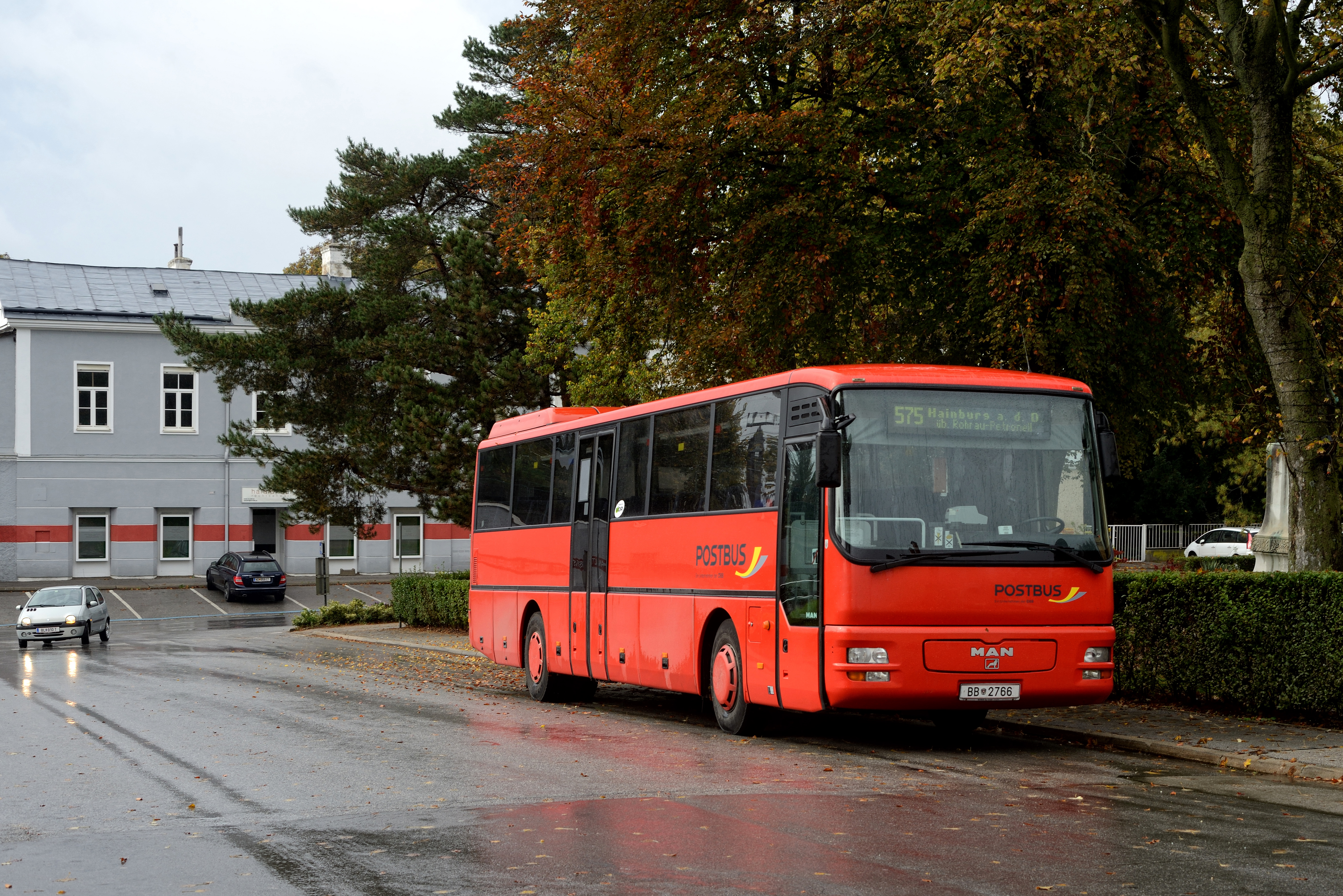 MAN ÜL 353, BB 2766, als Linie 575 beim Brucker Bahnhof.